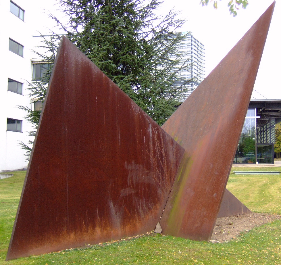 Metallplastik Durchbruch (1980/1992) von Hermann Glöckner vor dem Bundeshaus am Platz der Vereinten Nationen (zum Zeitpunkt der Aufnahme Görrestraße) in Bonn.